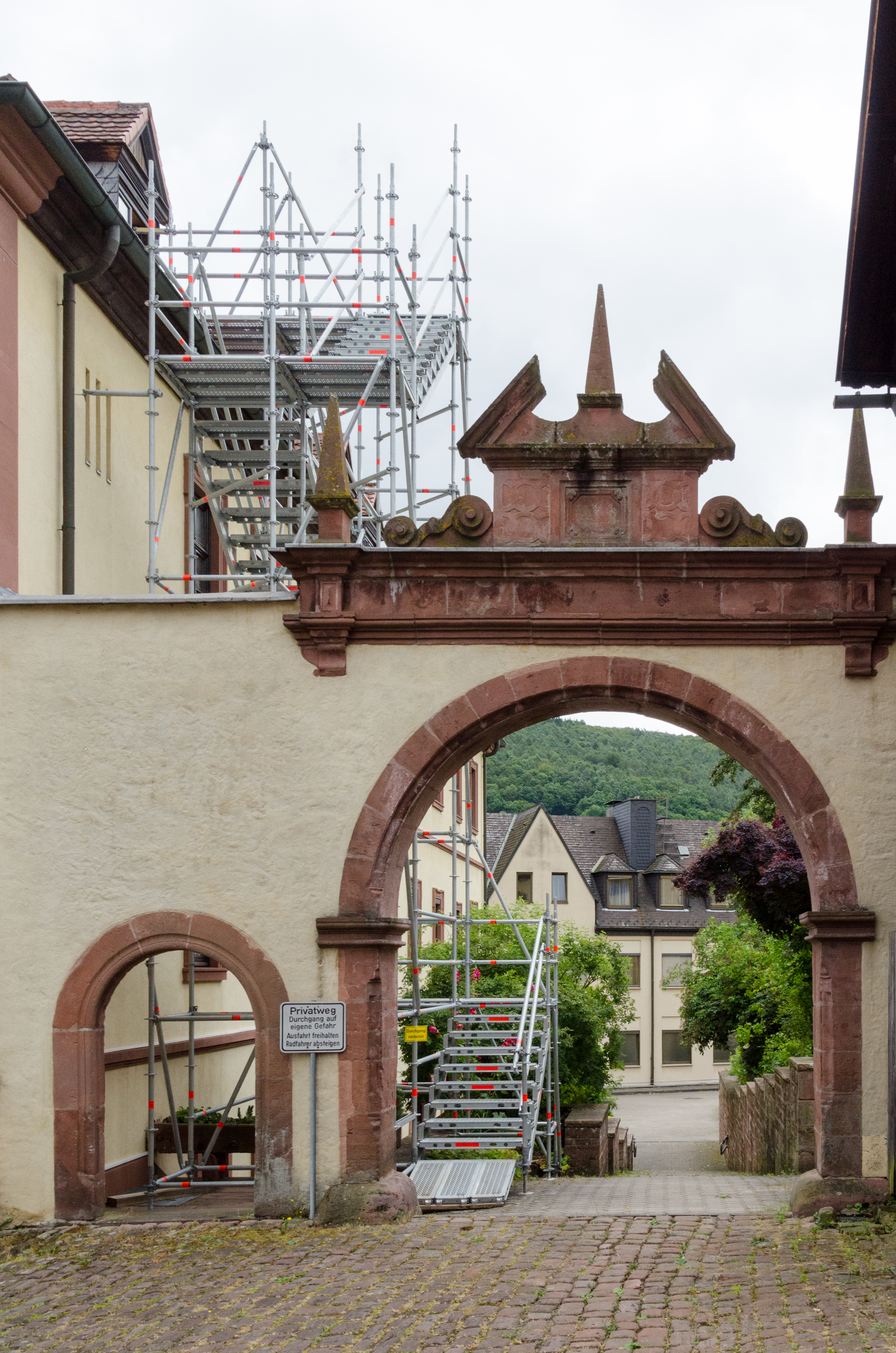 Neustadt am Main, Klostermauer